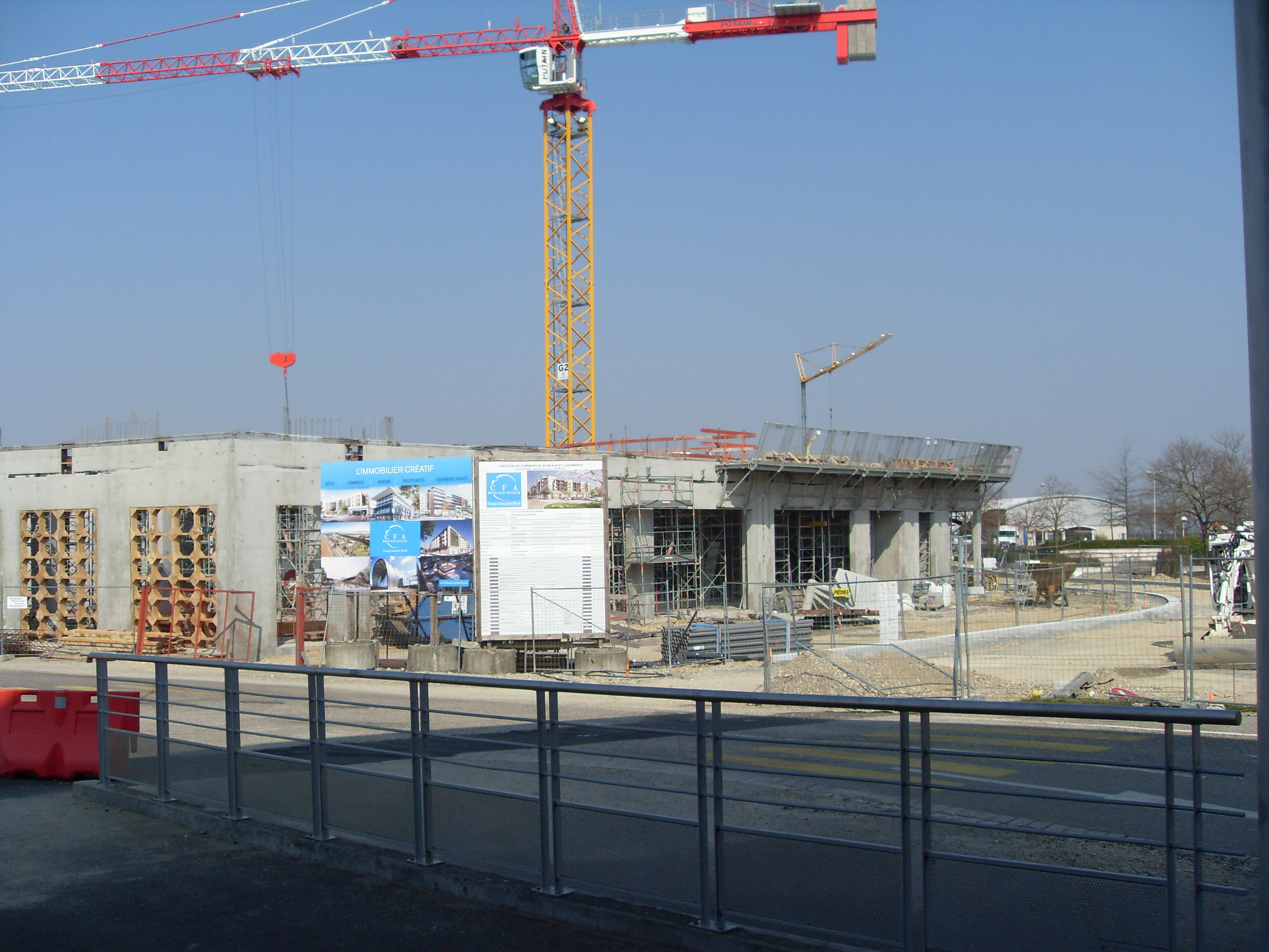 Bâtiment en construction à Villefontaine (Isère). Celui-ci accueille des commerces au rez-de-chaussée (Casino et Pharmacie), des habitations en étage et des garages en sous-sol. En mars 2014.